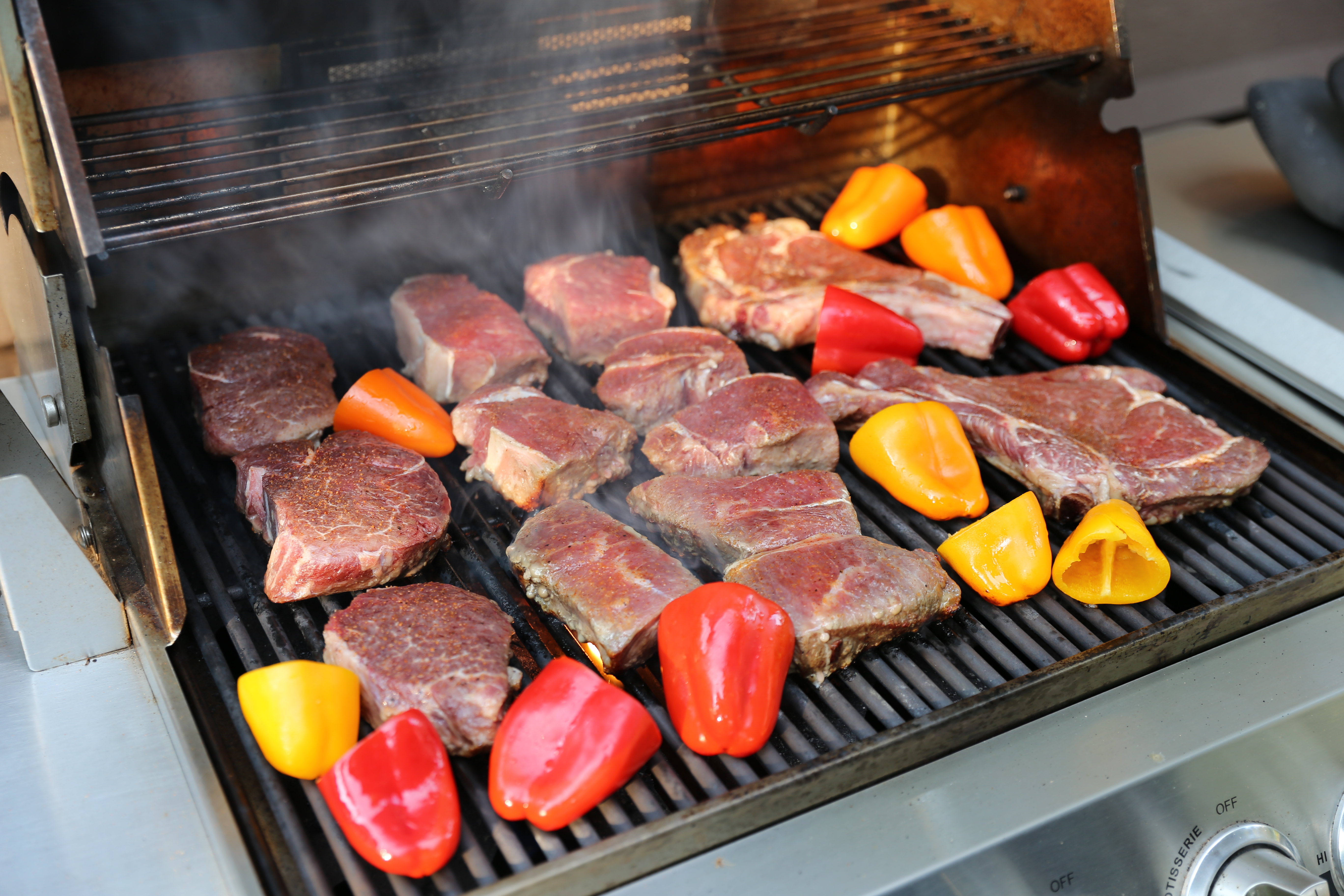 Goose Lake